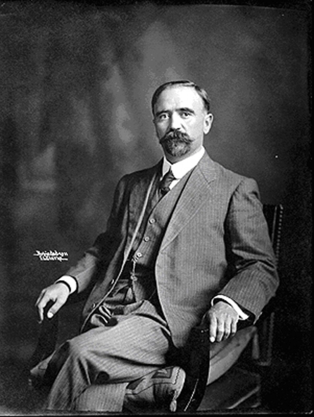 Francisco Madero, sentado en un sillón. Fotografía en blanco y negro.